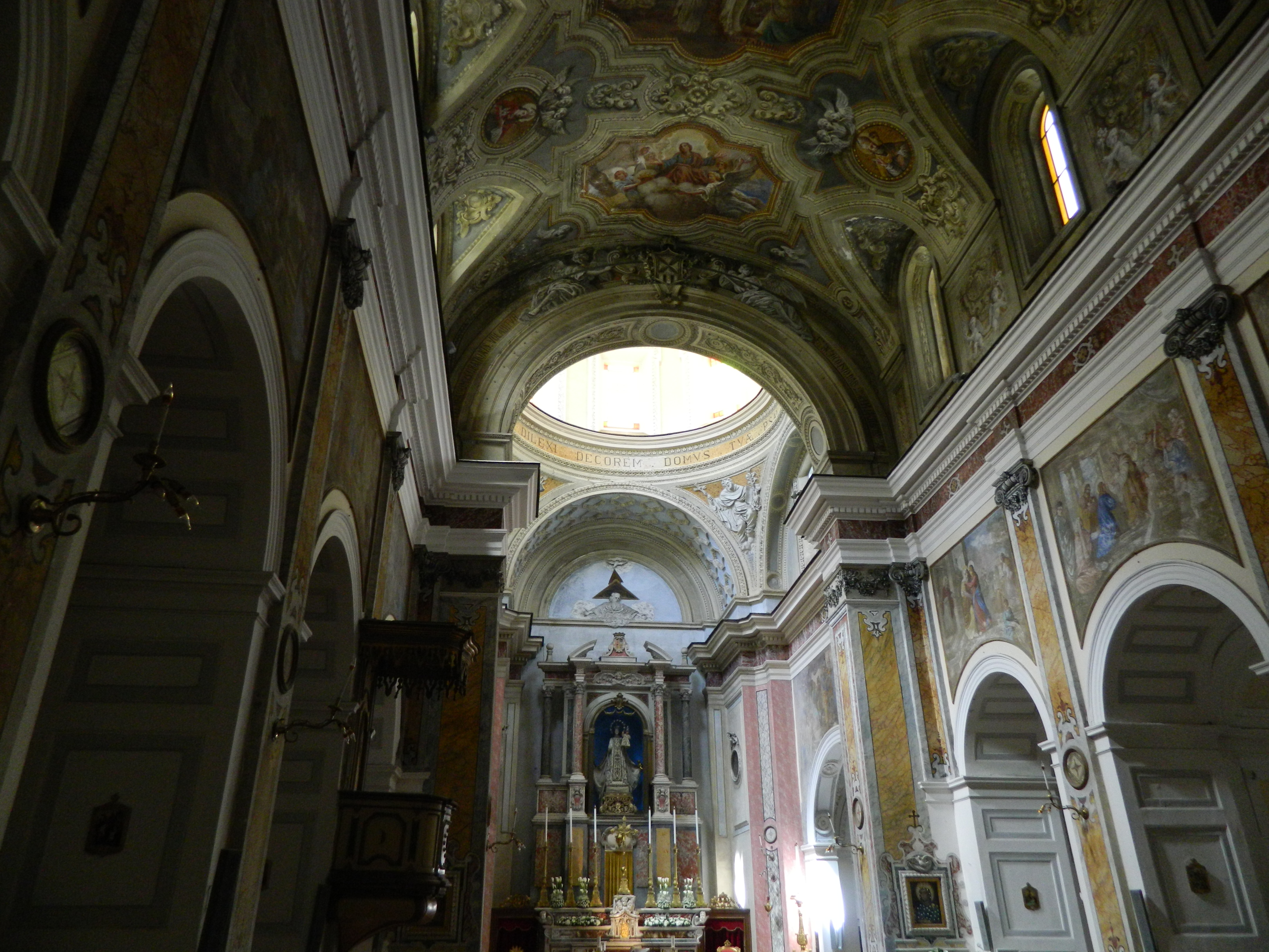 Orsola a Chiaia (Napoli)